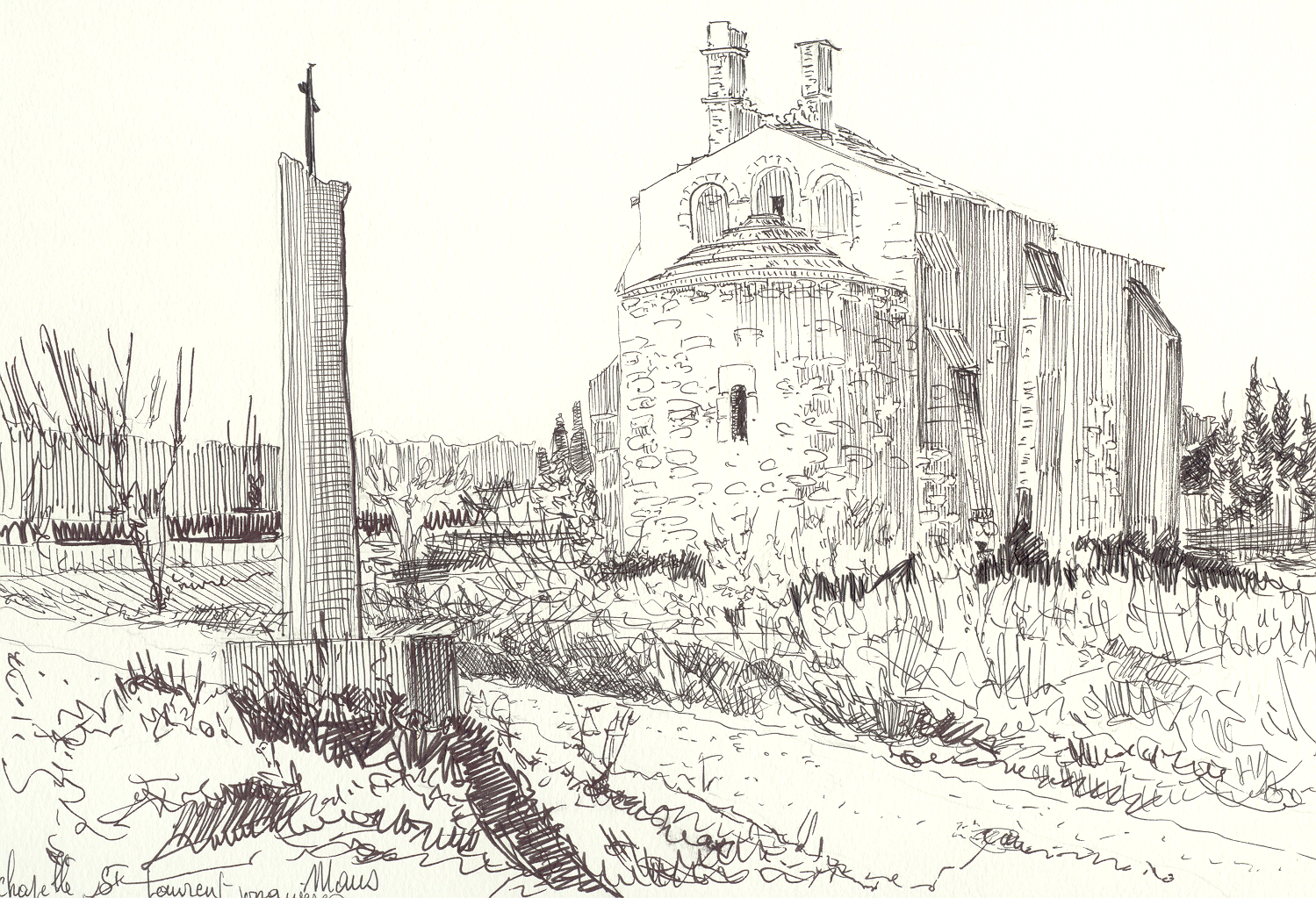 Petite chapelle Saint Laurent de la commune de Jonquières-Saint-Vincent.